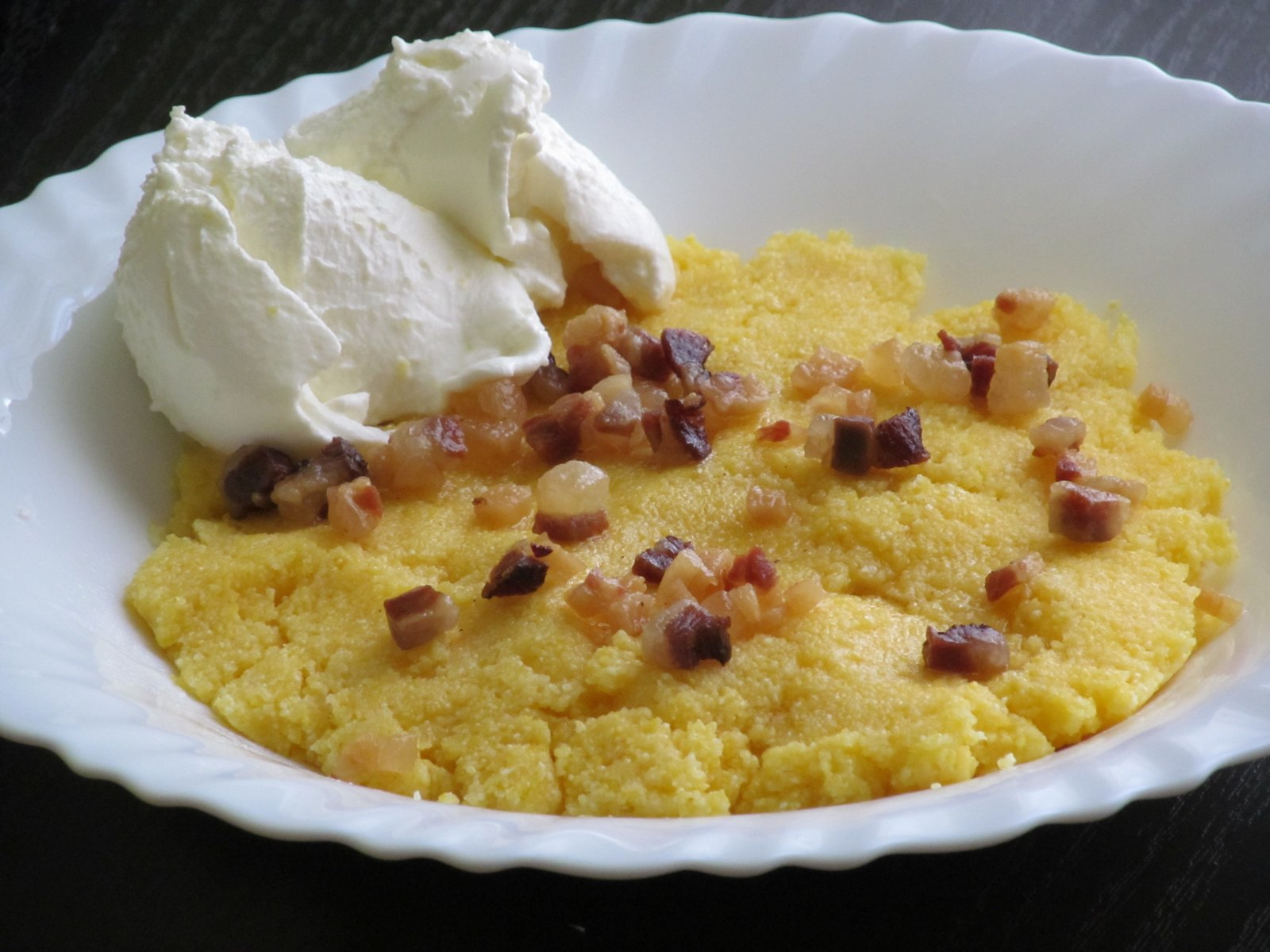 Cicvara a smarni változta, Szegeden és környékén cicvara vagy csicsvara néven emlegetik, mely a térségben közismert, hasonló módon készülő étel.